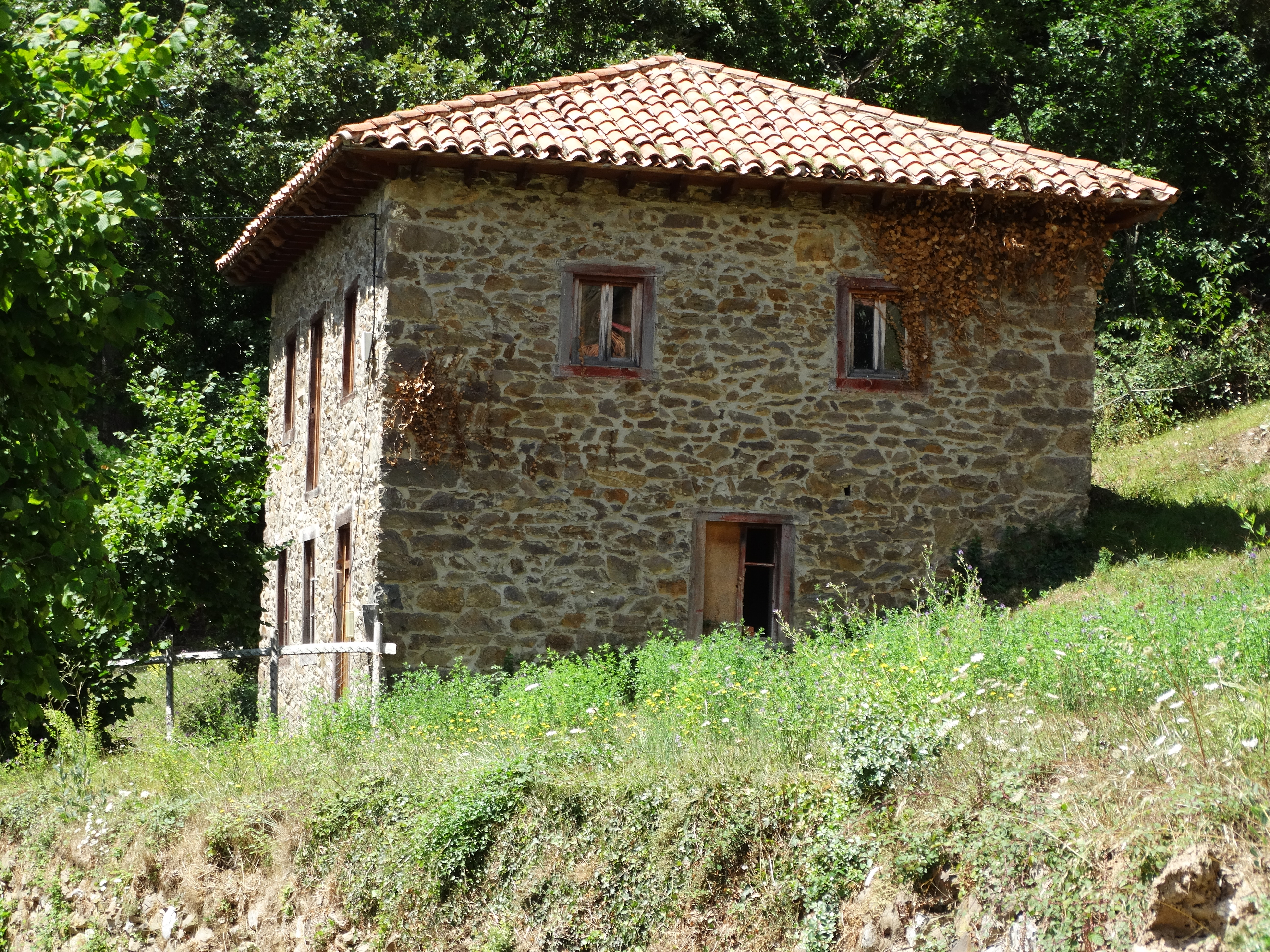 Salarzón es una localidad del municipio de Cillorigo de Liébana, en la comarca de Liébana (Cantabria, España). Escuelas mandadas construir por el conde de la Cortina Vicente Gómez de la Cortina y Salceda en el barrio de Esanos de Salarzón.